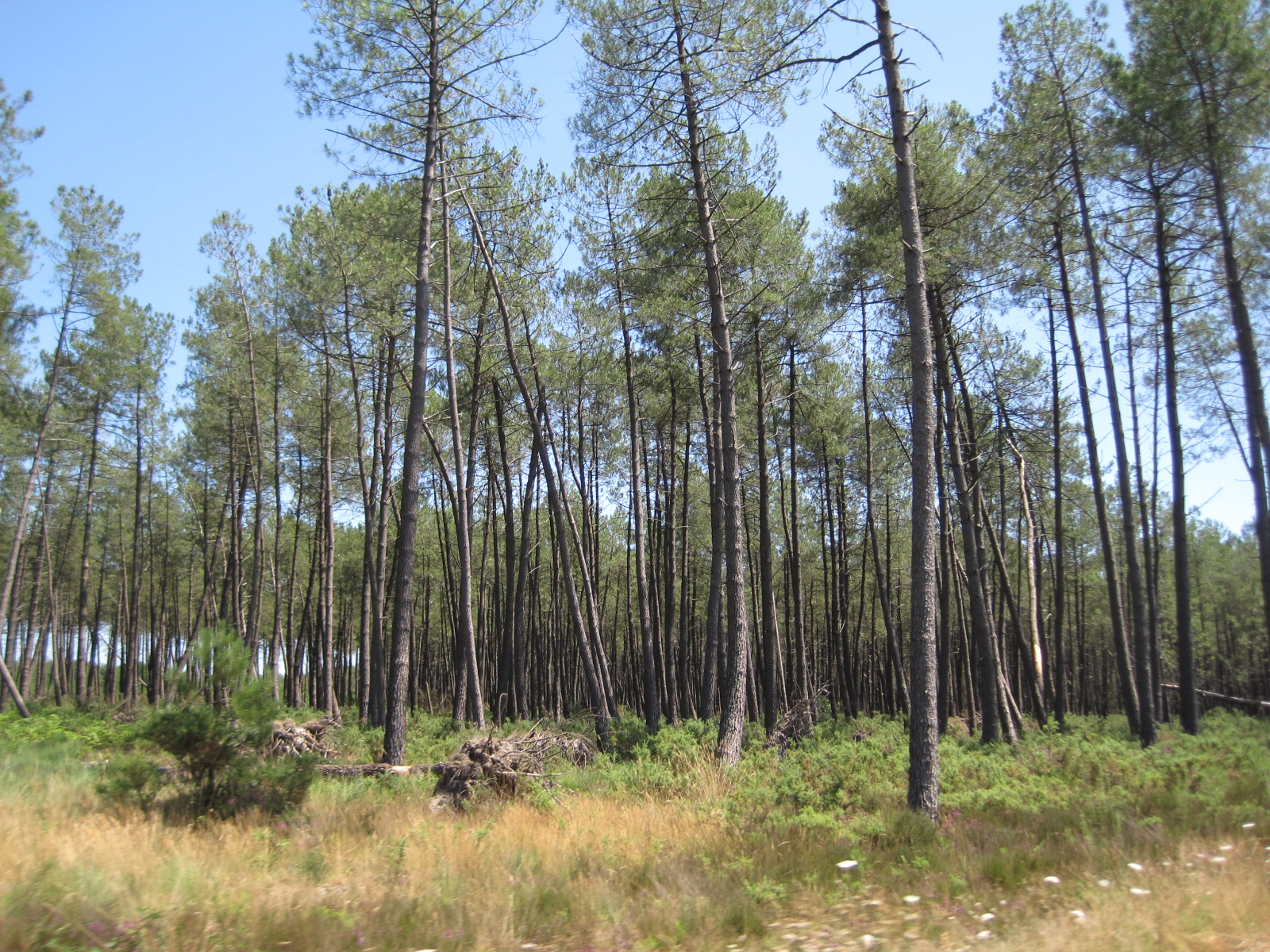 Pins des Landes - pinède - France